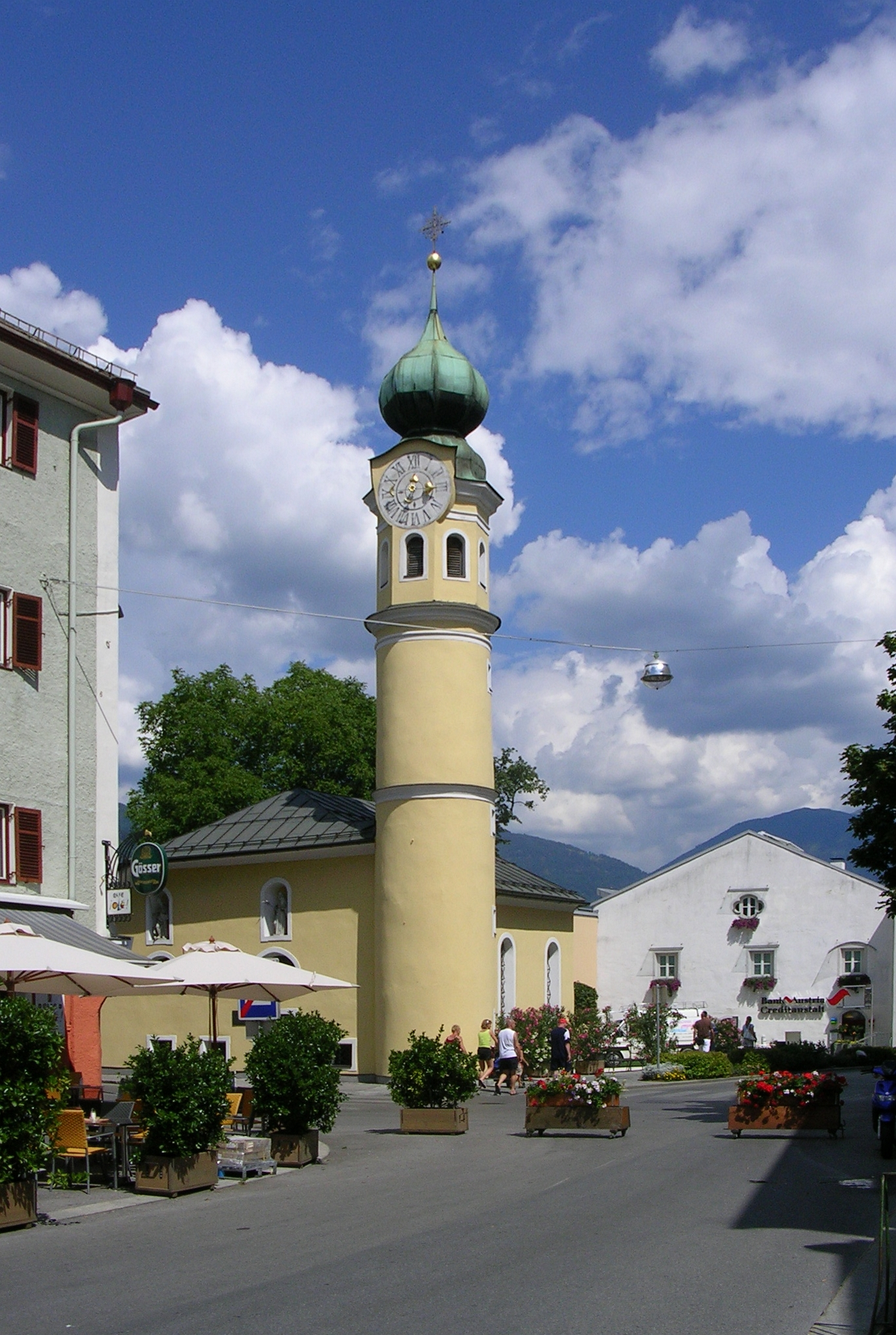 Das Antoniuskirchl gesehen vom Hauptplatz in Lienz